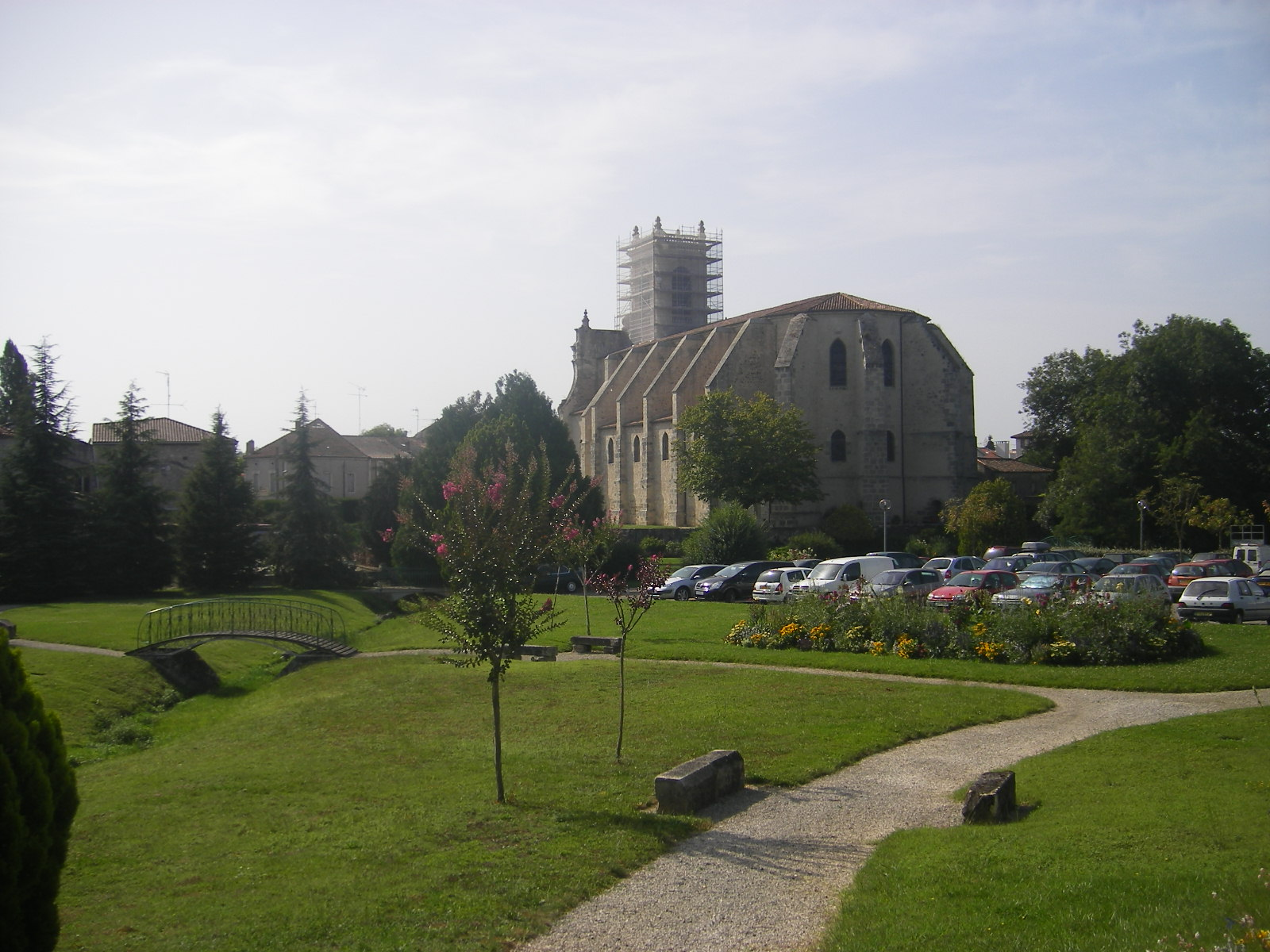 Casteljaloux